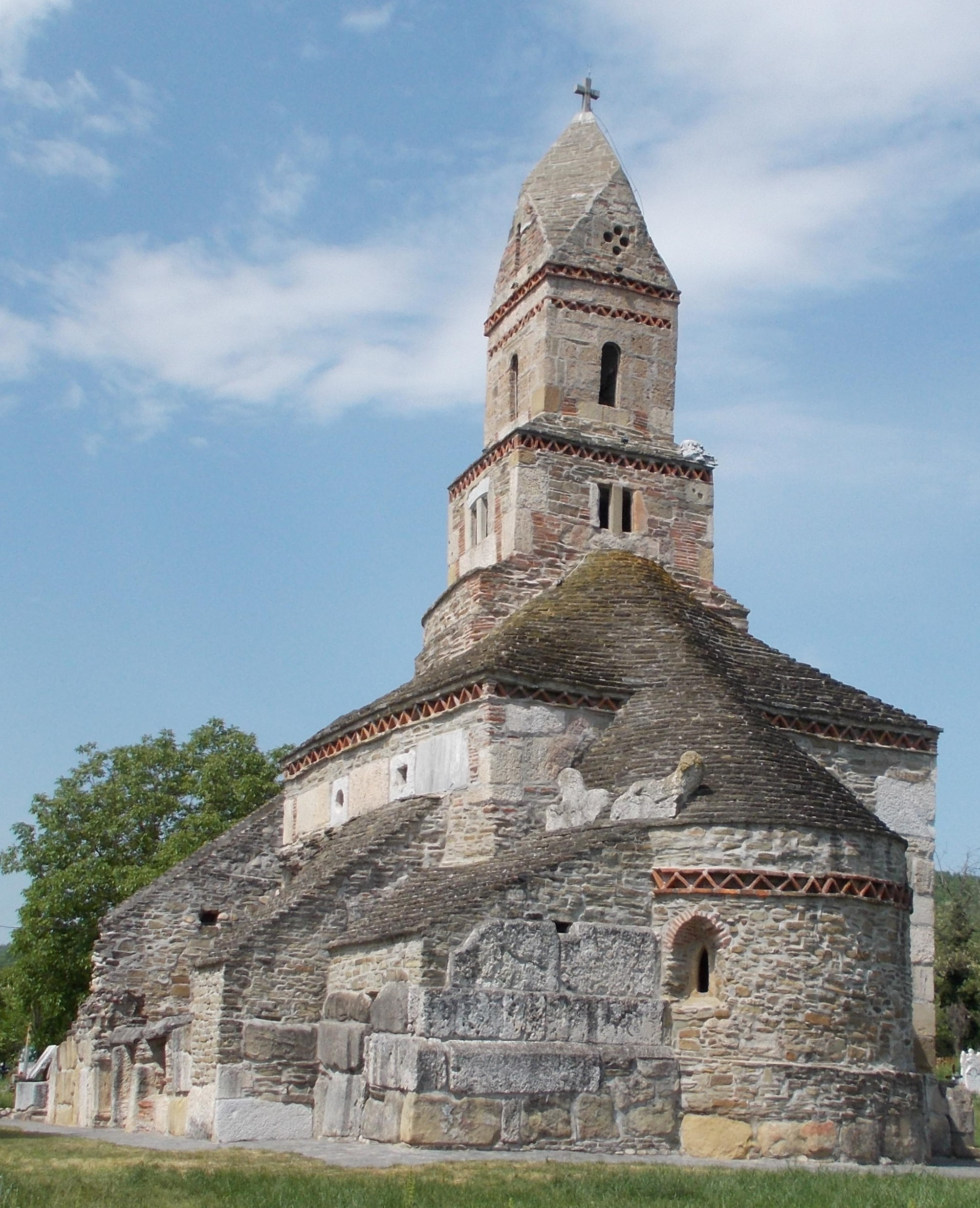 Biserica de piatră ”Sfântul Nicolae” din satul Densuș, județul Hunedoara